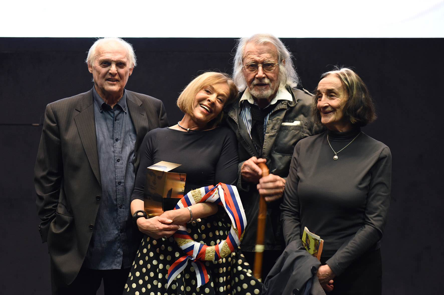 Dosedanji prejemniki nagrade bert: Radko Polič, Milena Zupančič, Miha Baloh in Ivanka Mežan.